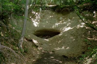 Wind- bzw. Wetterloch des Aerostahlstollens der Ofenkaulen (unterirdischer Steinbruch für Backofensteine, U-Verlagerung „Schlammpeitzger“) bei Königswinter